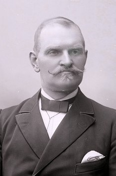 Oluf Hansen Hagen (1845–1903), stortingsmann for kjøpstedene Trondhjem og Levanger (Venstre) 1898–1900.